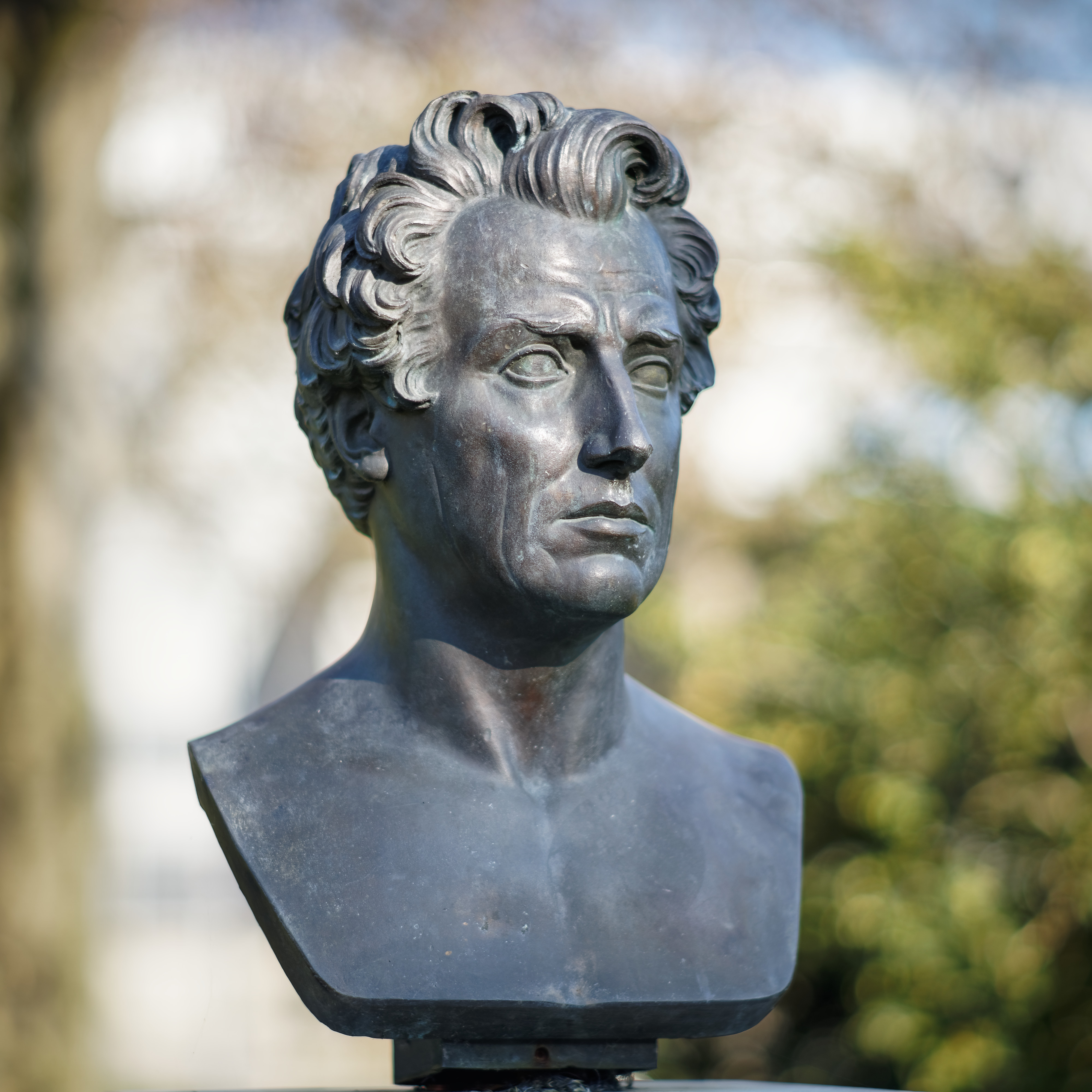 Heinrich Moser. Schaffhauser Industriepionier. 1805 – 1874. Die Bildnisbüste steht im Schaffhauser «Mosergarten».